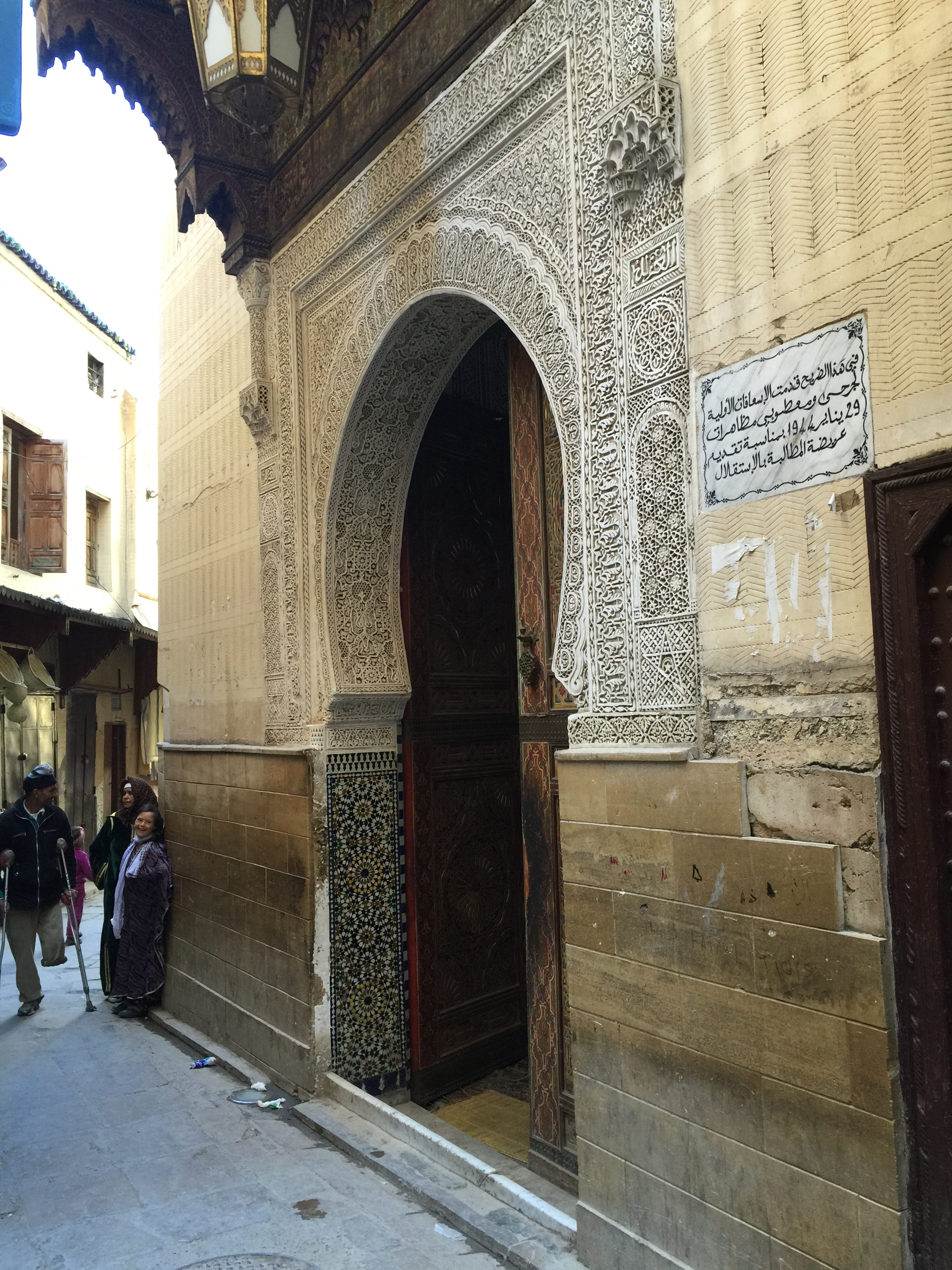 L'une portes d'entrée de la Zaouiya Tidjaniya mère à Fès